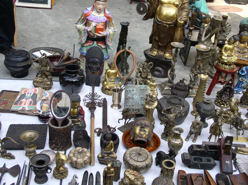 Insadong, Seoul, Korea